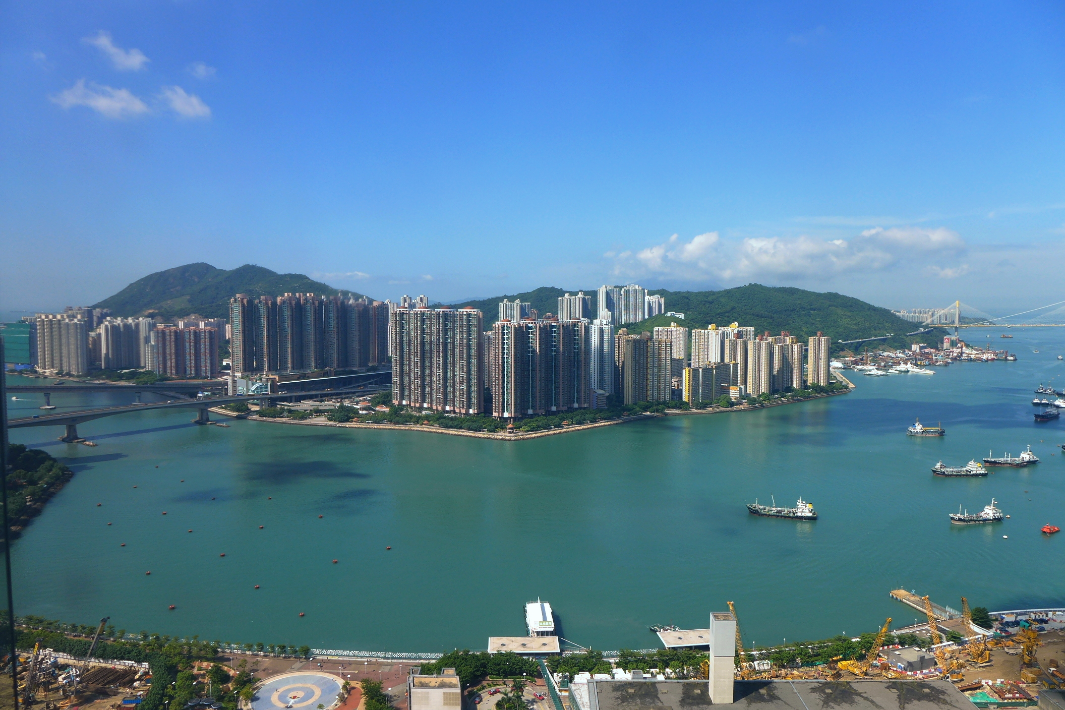 Tsing Yi Overview